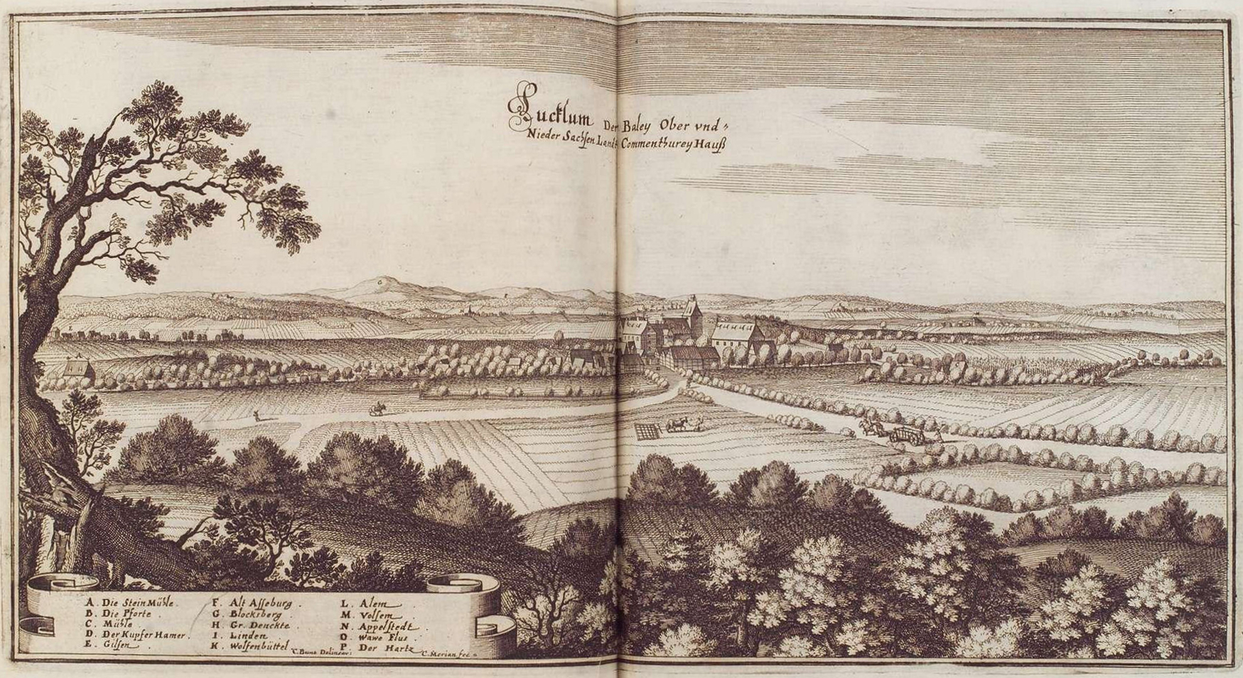 Lucklum. Kupferstich aus der Topographia Germaniae von Matthäus Merian, 1654/58. Siehe Wikisource: Topographia Braunschweig Lüneburg: Lucklum